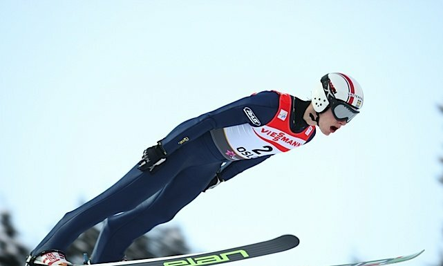 Carl Nordin podczas serii treningowej przed konkursem indywidualnym mężczyzn na Mistrzostwach Świata w Narciarstwie Klasycznym 2011 w Oslo.